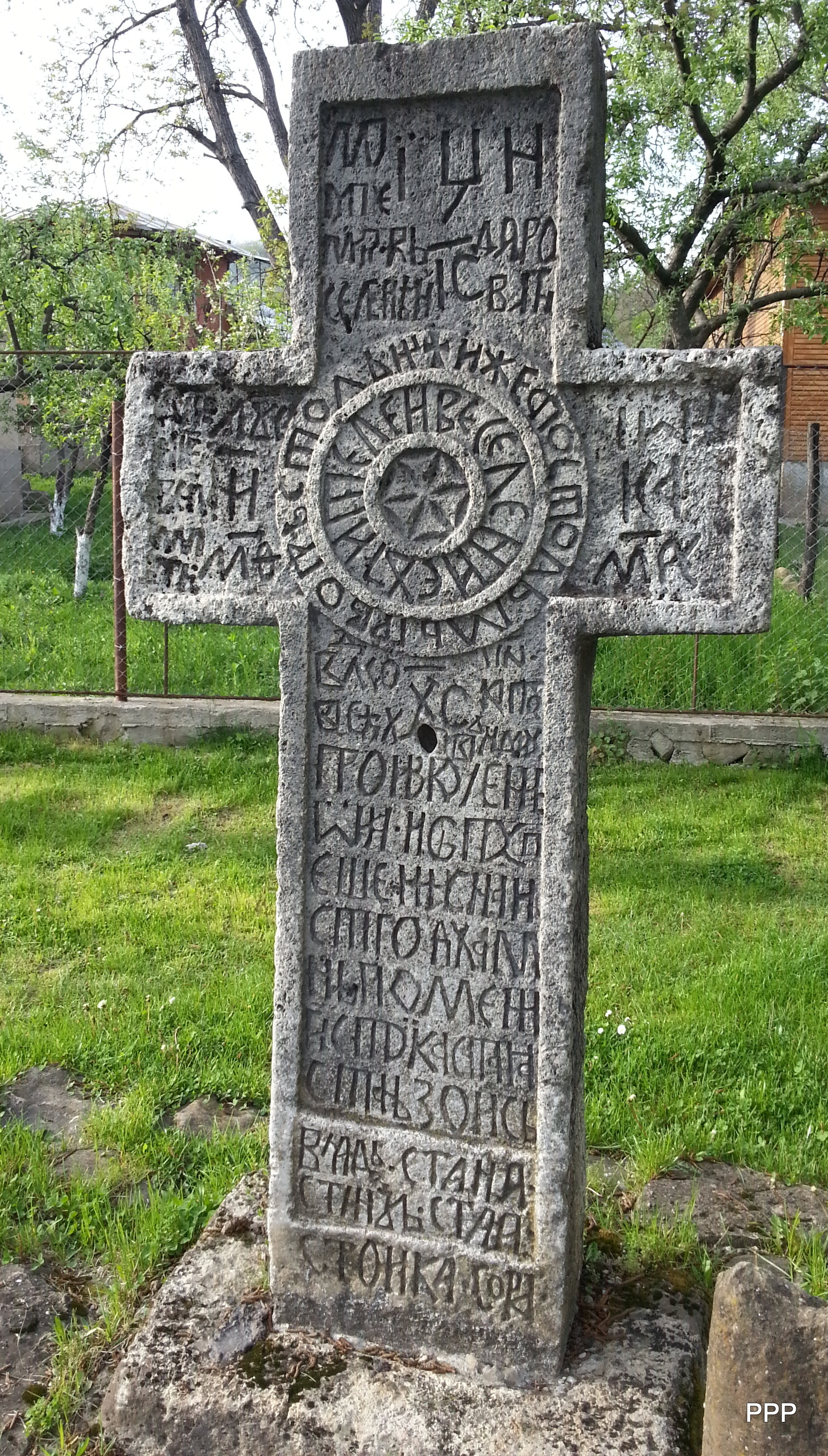 Cruce de pomenire (de drum) din piatră